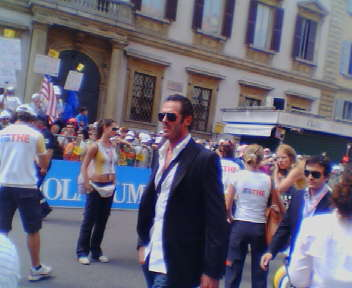 Milano: Foto che riprende Mario Cipollini, ospite d'onore del Giro, che passeggia su Corso Venezia prima dell'arrivo della corsa rosa.